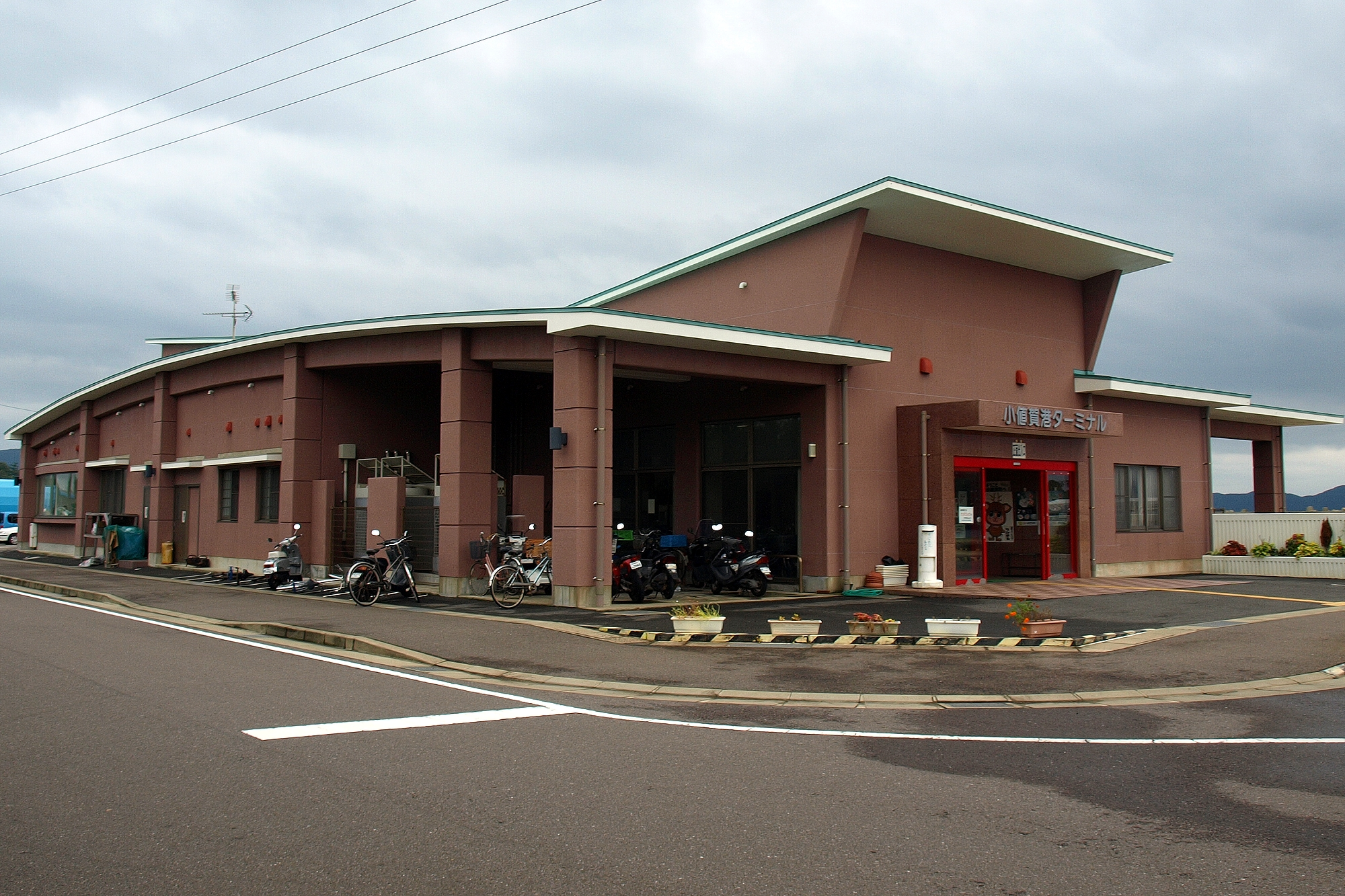 長崎県小値賀町の小値賀港ターミナル